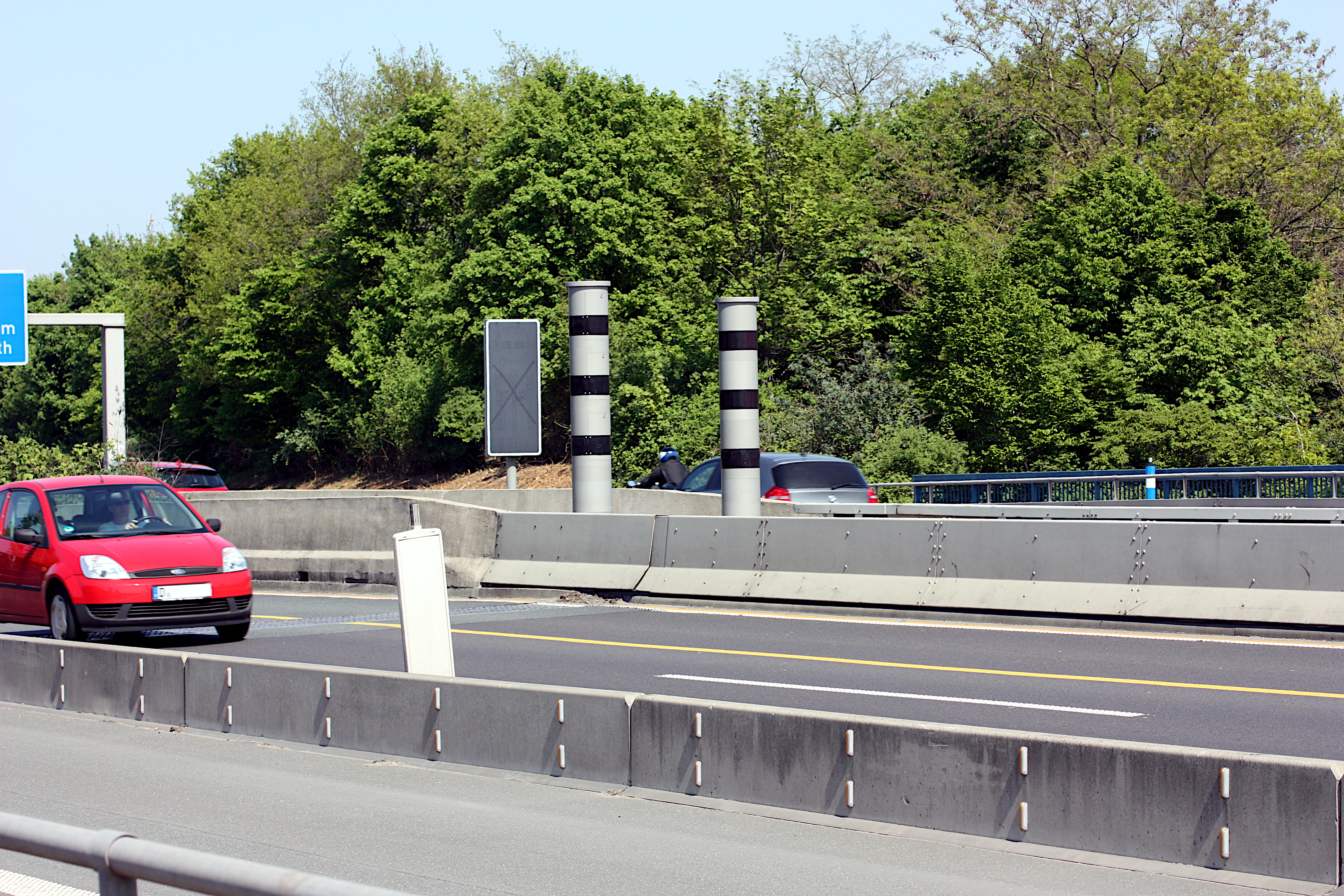 Blitzanlage auf der Fleher Brücke